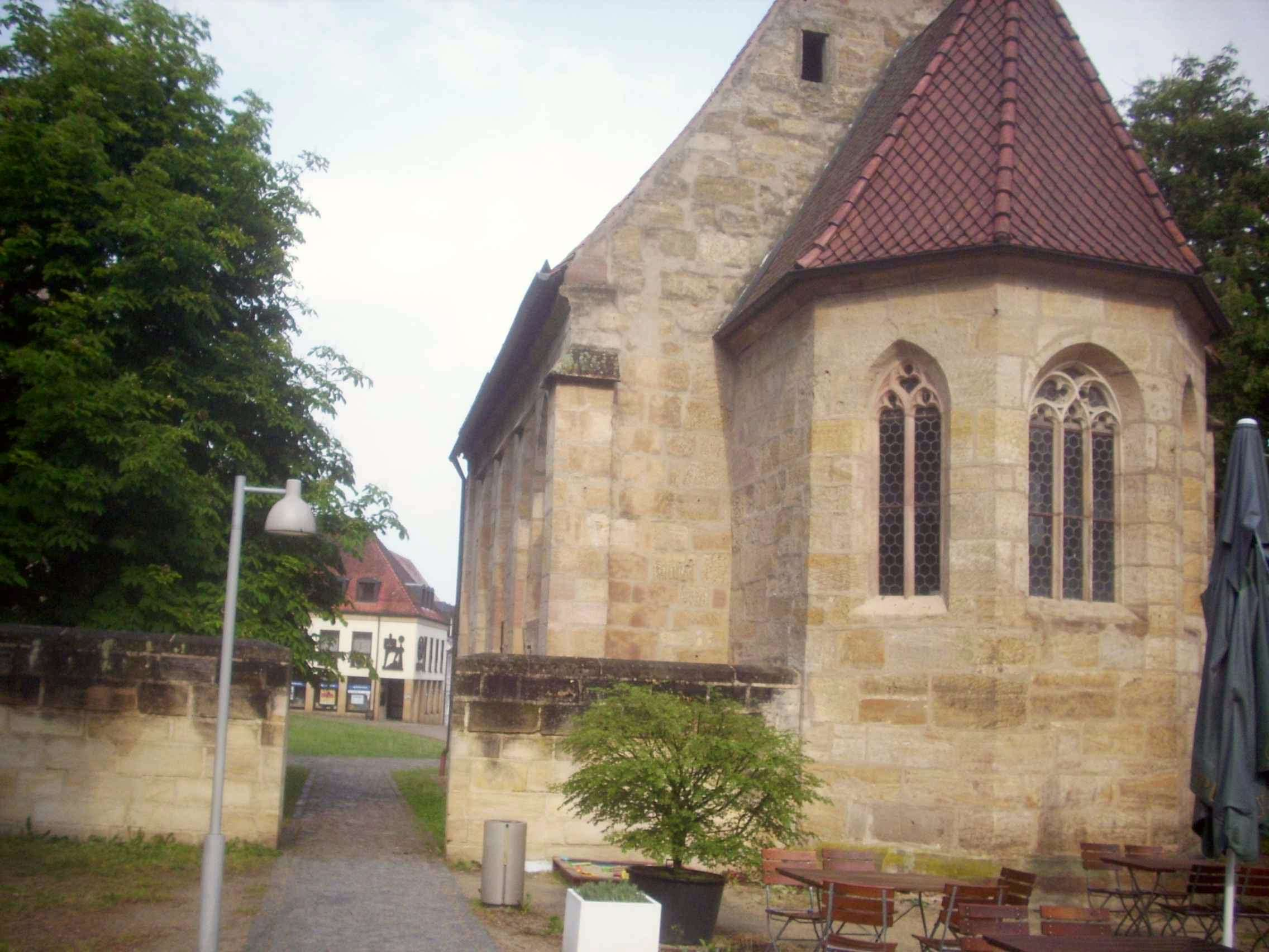 Neunkirchen am Brand-Klosterkirche-Katharinenkapelle-Ansicht von Osten über Chor-29052012